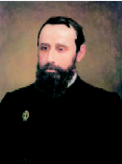 Александр Сергеевич Зарудный Alexandr Sergeevich Zarudny, russian lawyer